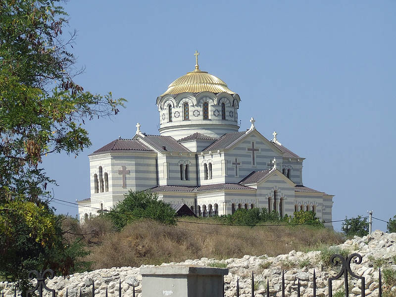 Chersonez Taurydzki - Sewastopol